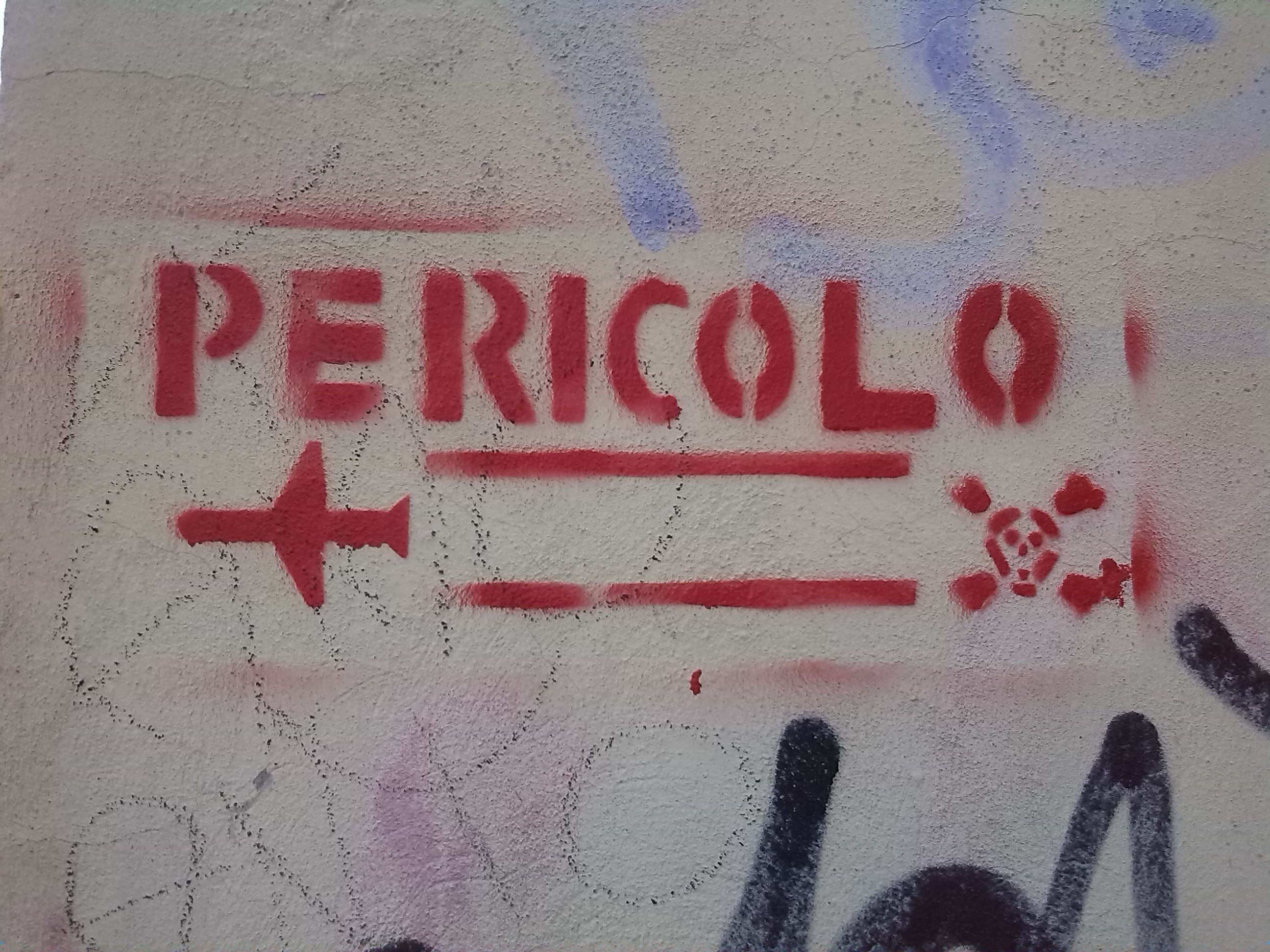 Graffito con la scritta "pericolo" riferita alle scie chimiche fotografato su un muro di Monza